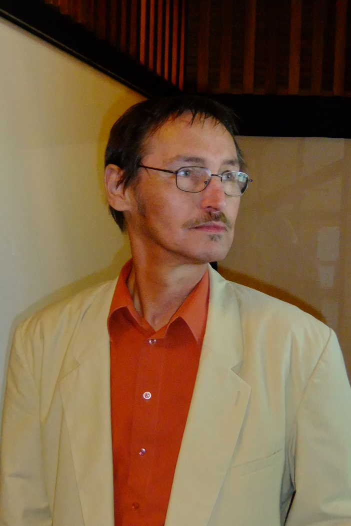 La esperantisto Benno Klehr